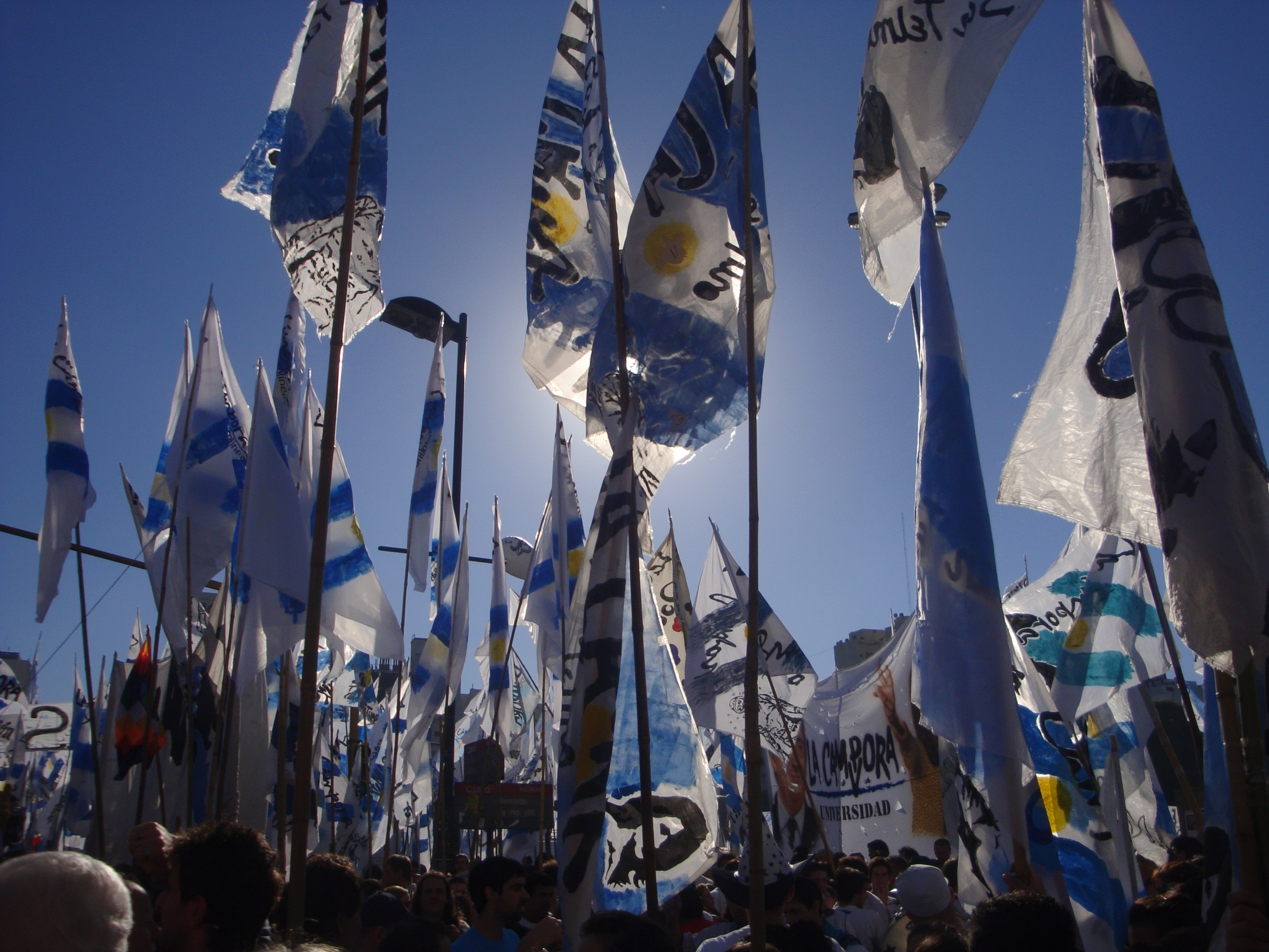 Militantes de La Cámpora durante la manifestación en conmemoración al 35º aniversario del golpe de Estado en Argentina de 1976.